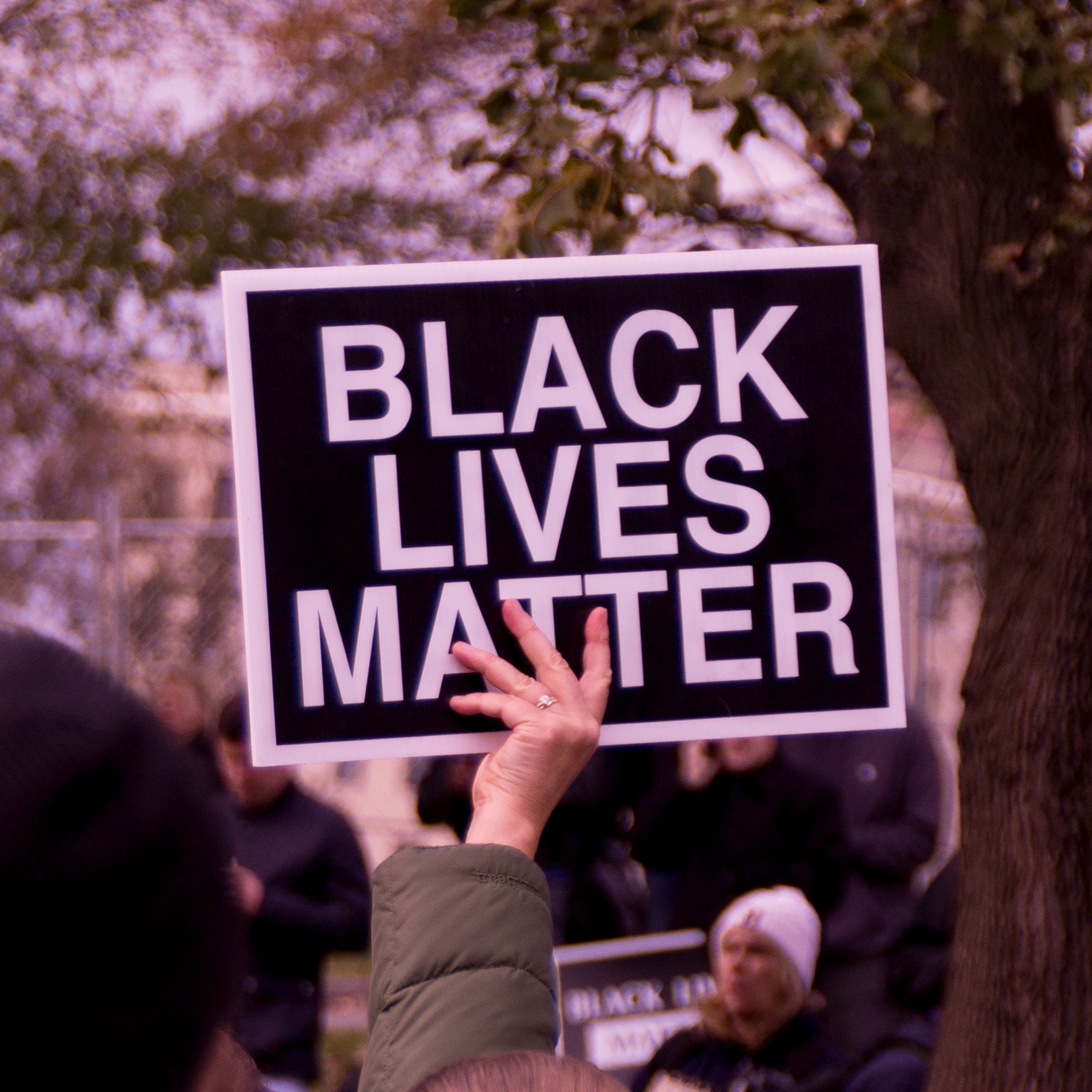 20171118-DSC03184